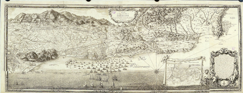 Setge de Barcelona de 1697